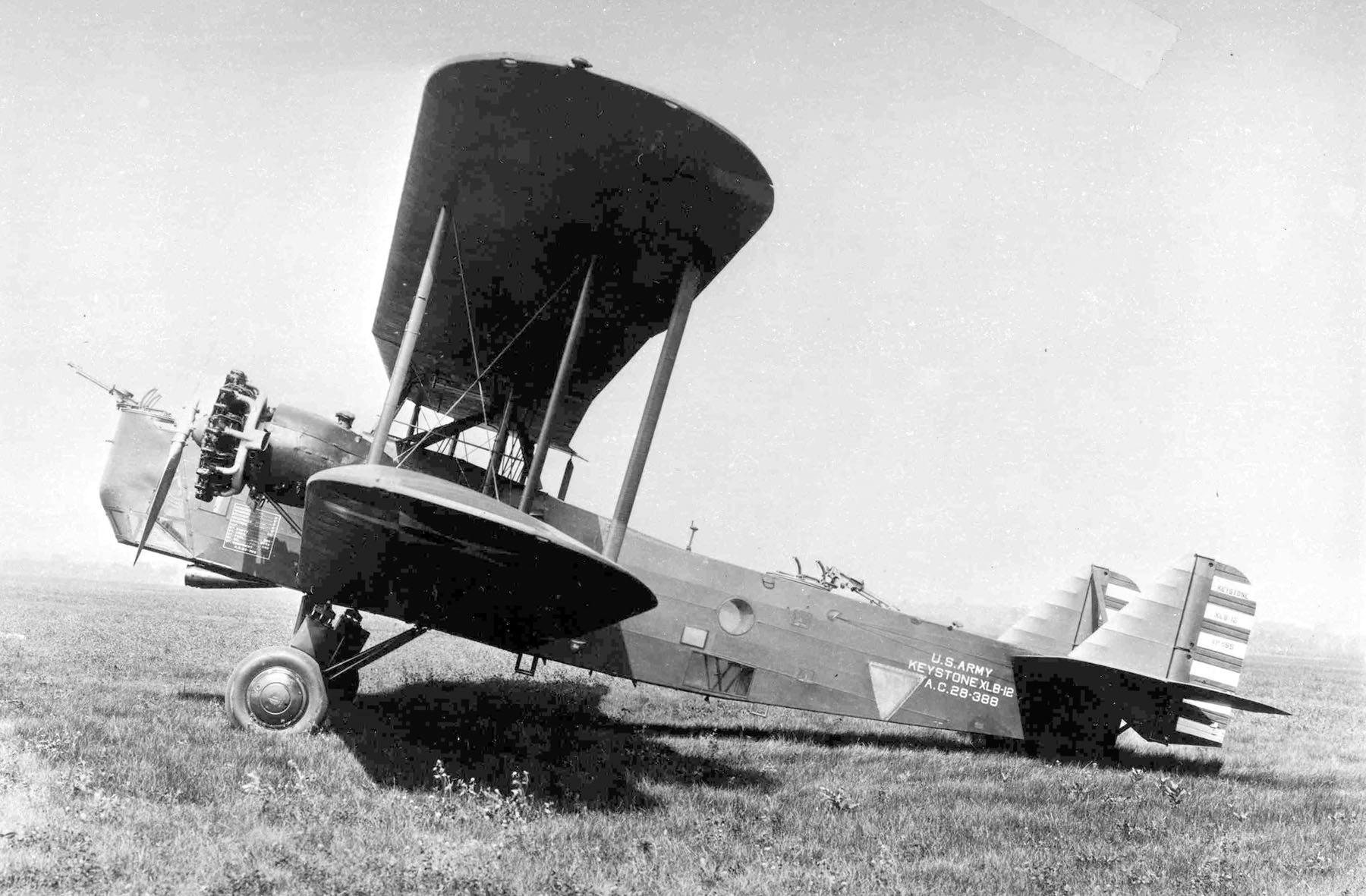 Keystone XLB-12 side view